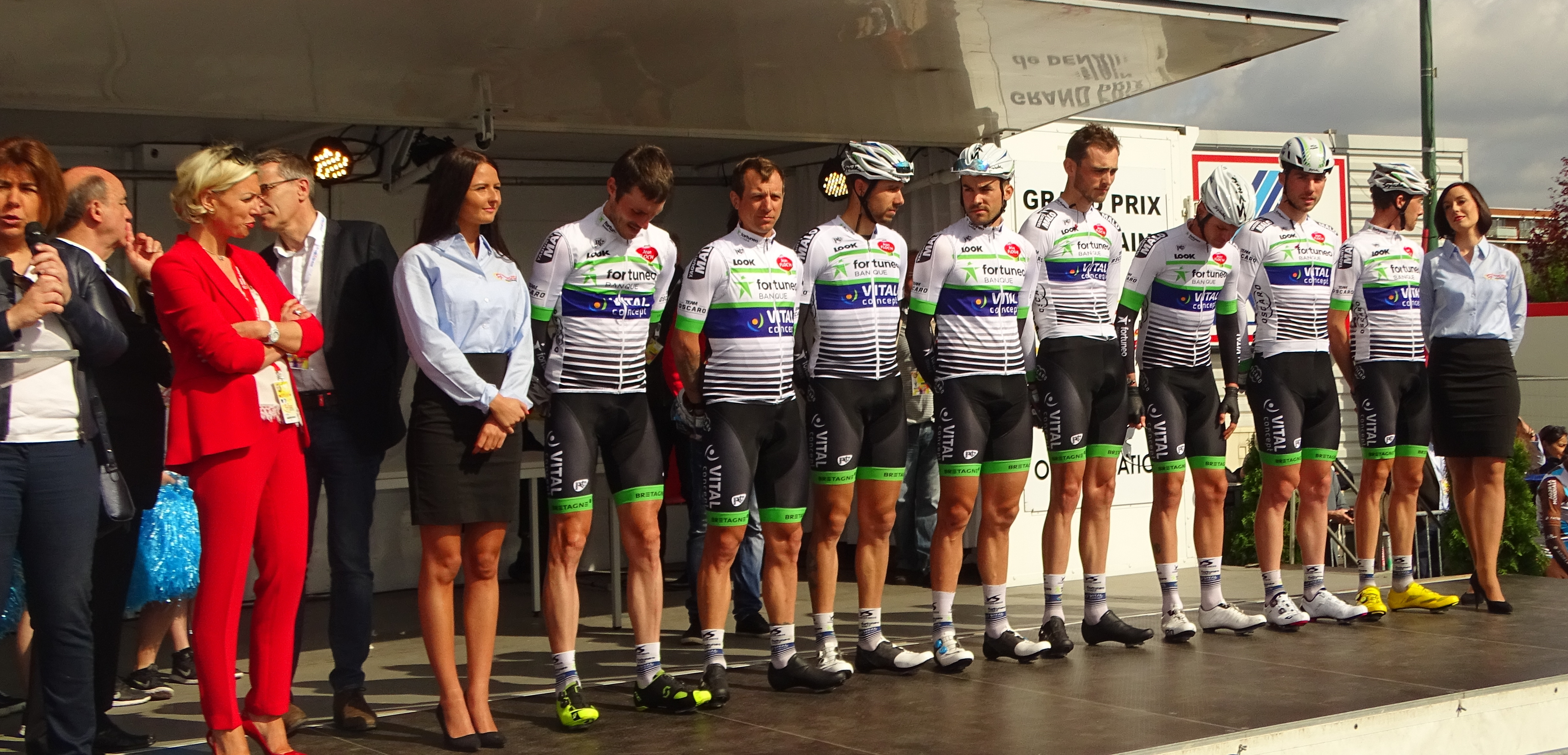 Reportage réalisé le jeudi 13 avril à l'occasion du départ et de l'arrivée du Grand Prix de Denain 2017 à Denain, Nord, Nord-Pas-de-Calais-Picardie, France.